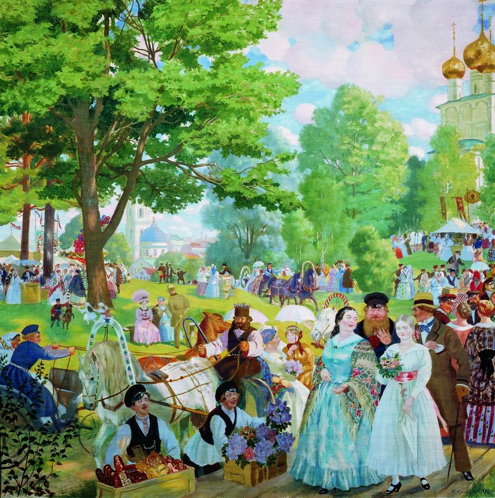 Б. М. Кустодиев. Троицын день 1920.